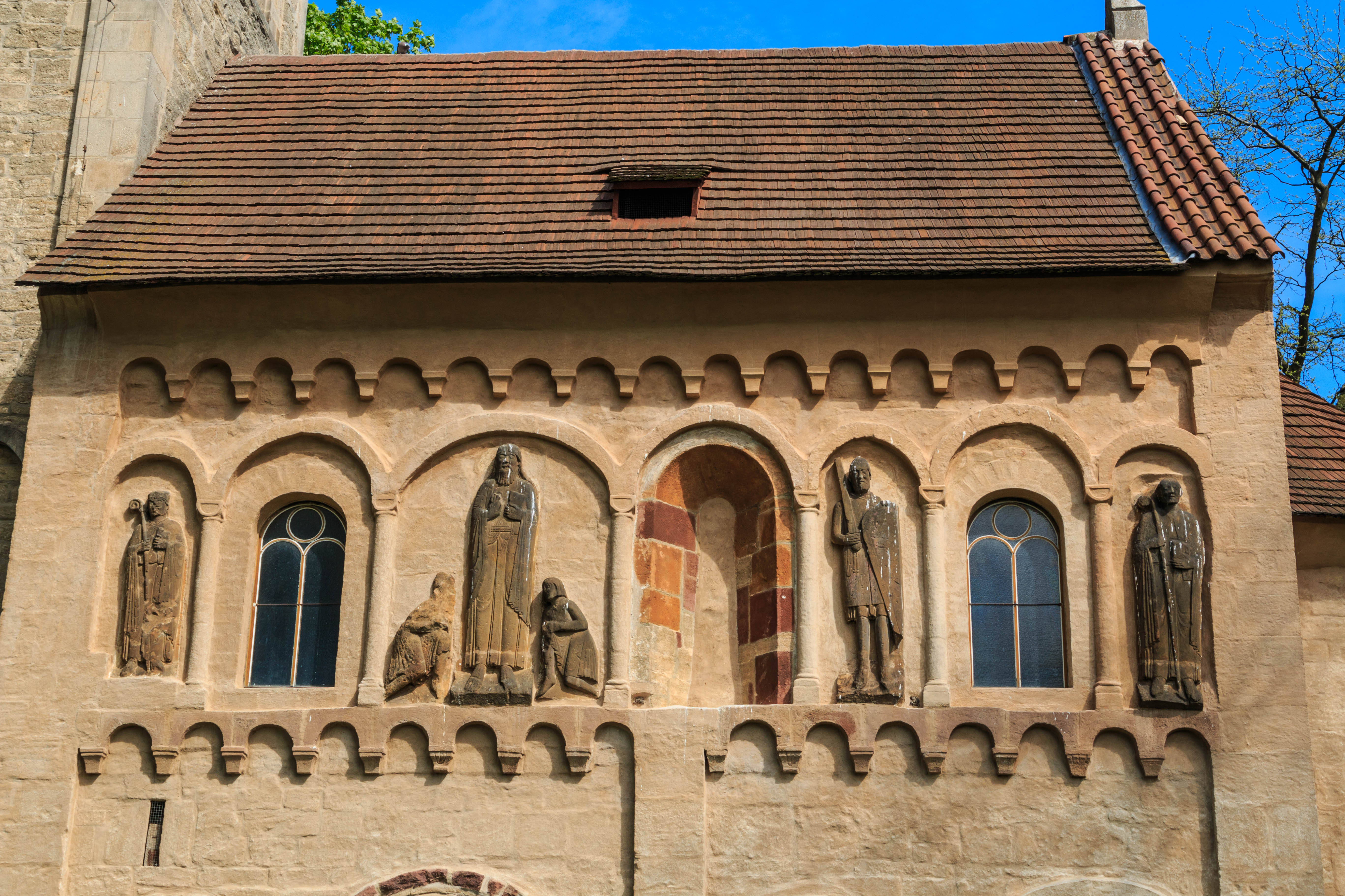 Kostel svatého Jakuba, Jakub (Církvice).